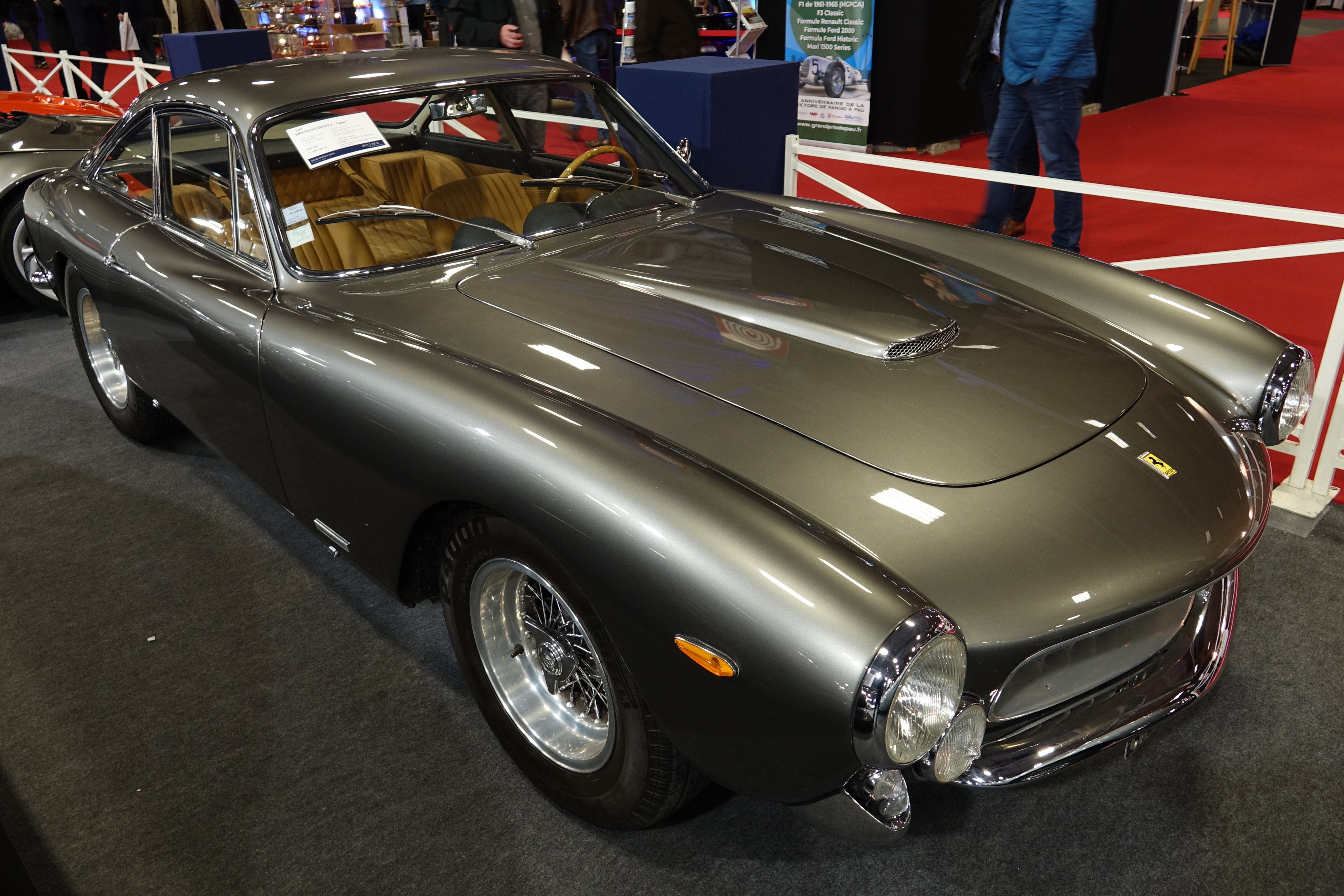 1964 Ferrari 250 GT Lusso s/n 5525G. Sold for 977,440 € at Vente Artcurial Rétromobile 2019.[1]